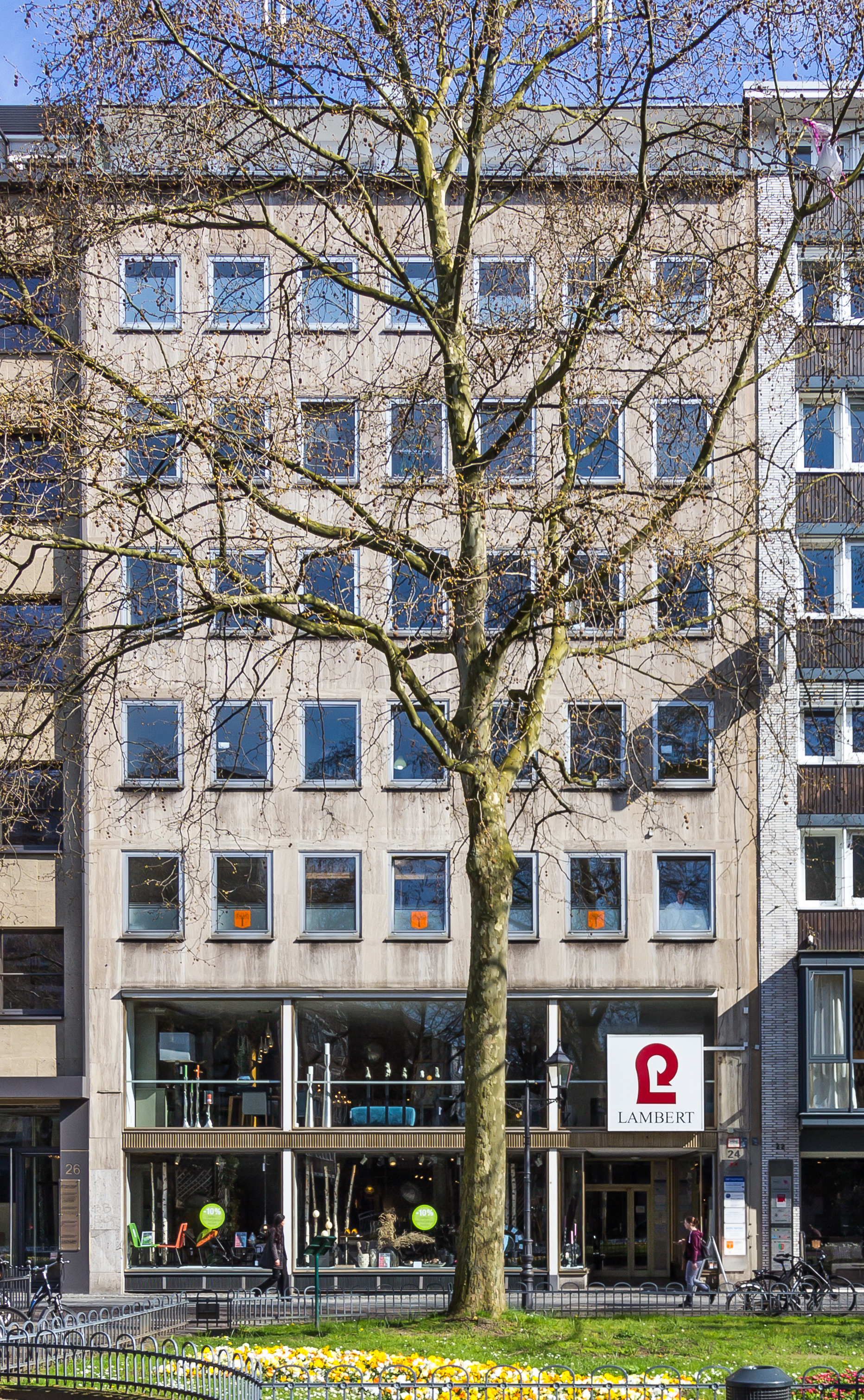 Wohn- und Geschäftshaus Kaiser-Wilhelm-Ring 24, Köln. Um 1952 erbaut; Architekt: Theodor Kelter